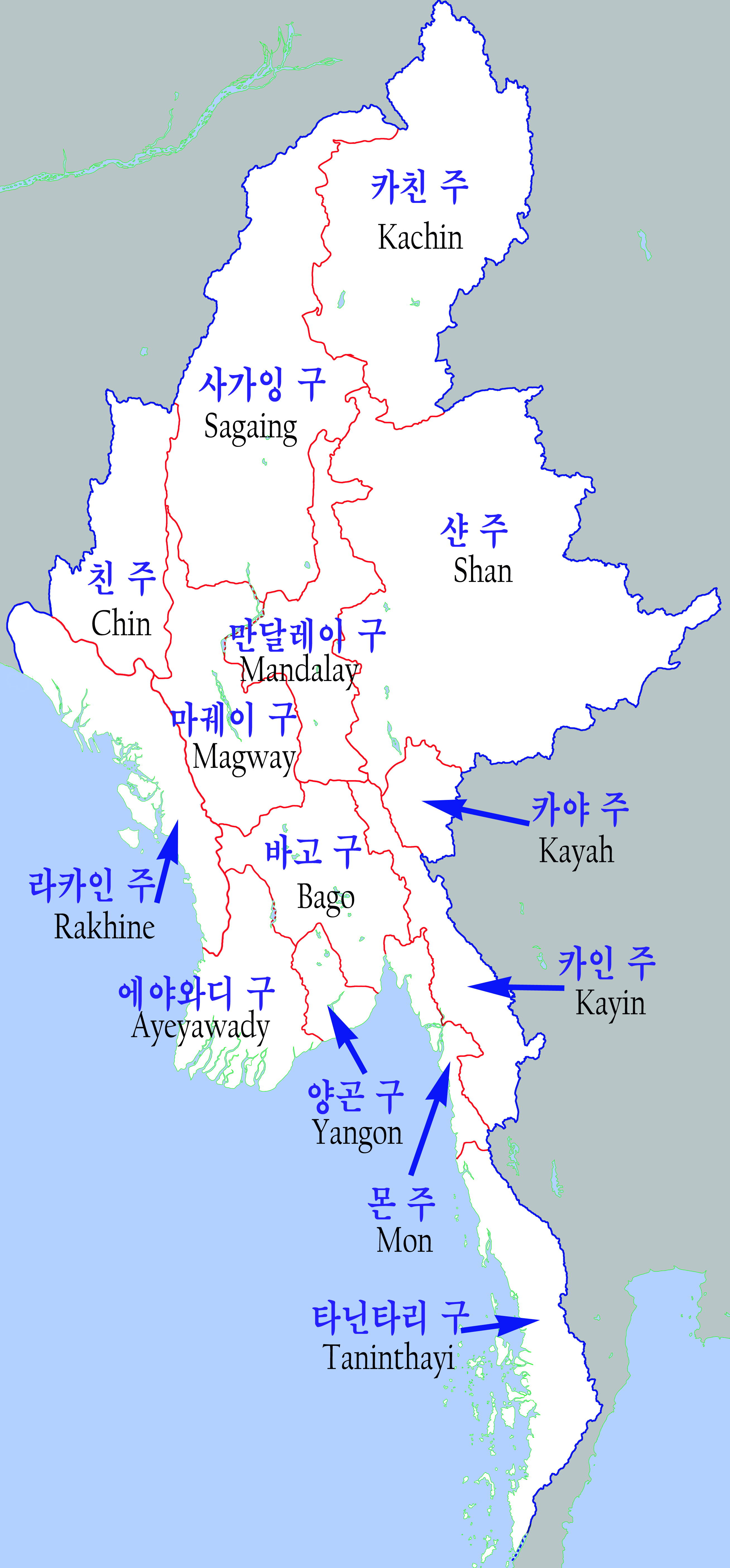 미얀마 행정구역